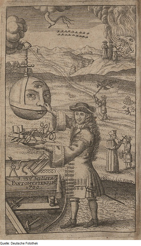 Original image description from the Deutsche Fotothek Radiästhesie & Wünschelrute